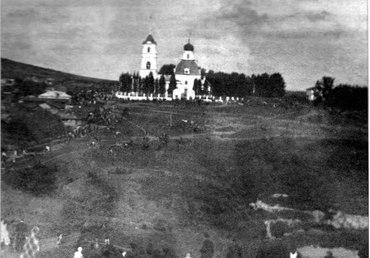 В центре снимка заводская плотина Уктусского завода. Люди спускаются с горки к ул. Зимней. Направление снимка с юга на север.